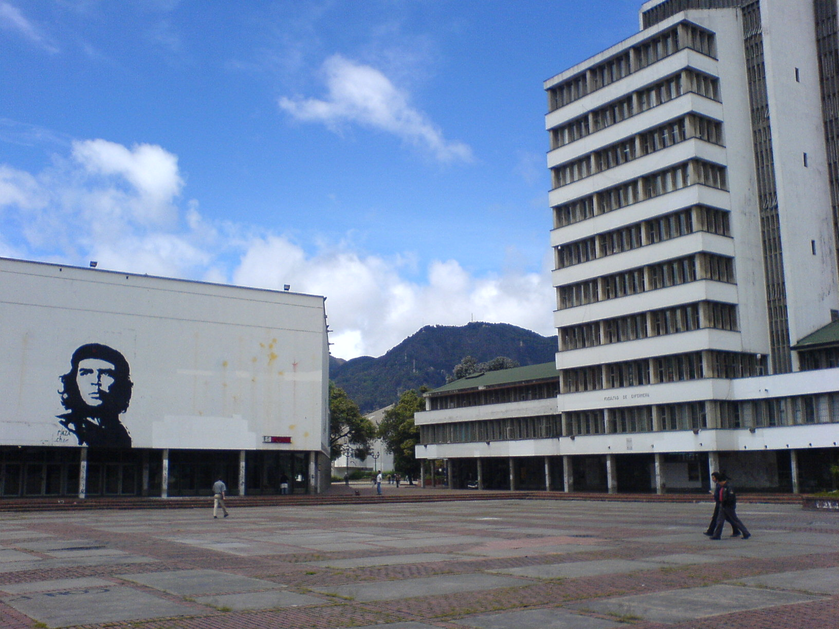 Plaza Che de Frente el Edifico de Enfermeria y el auditorio leon de greiff